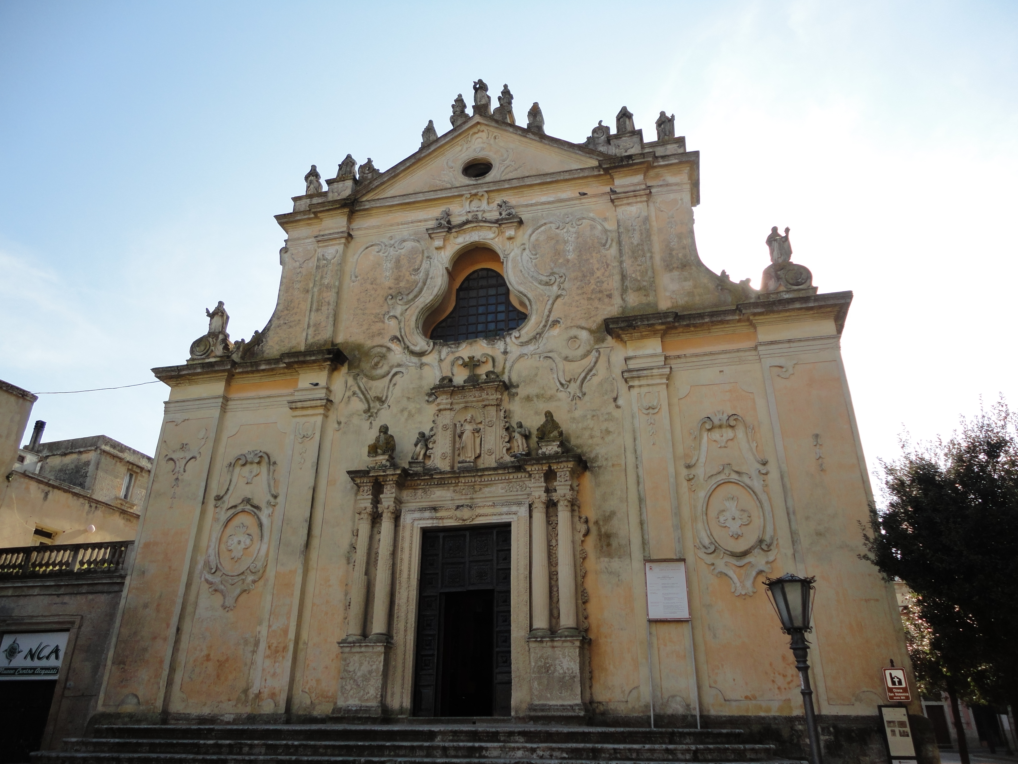 Chiesa di San Domenico Tricase, Lecce